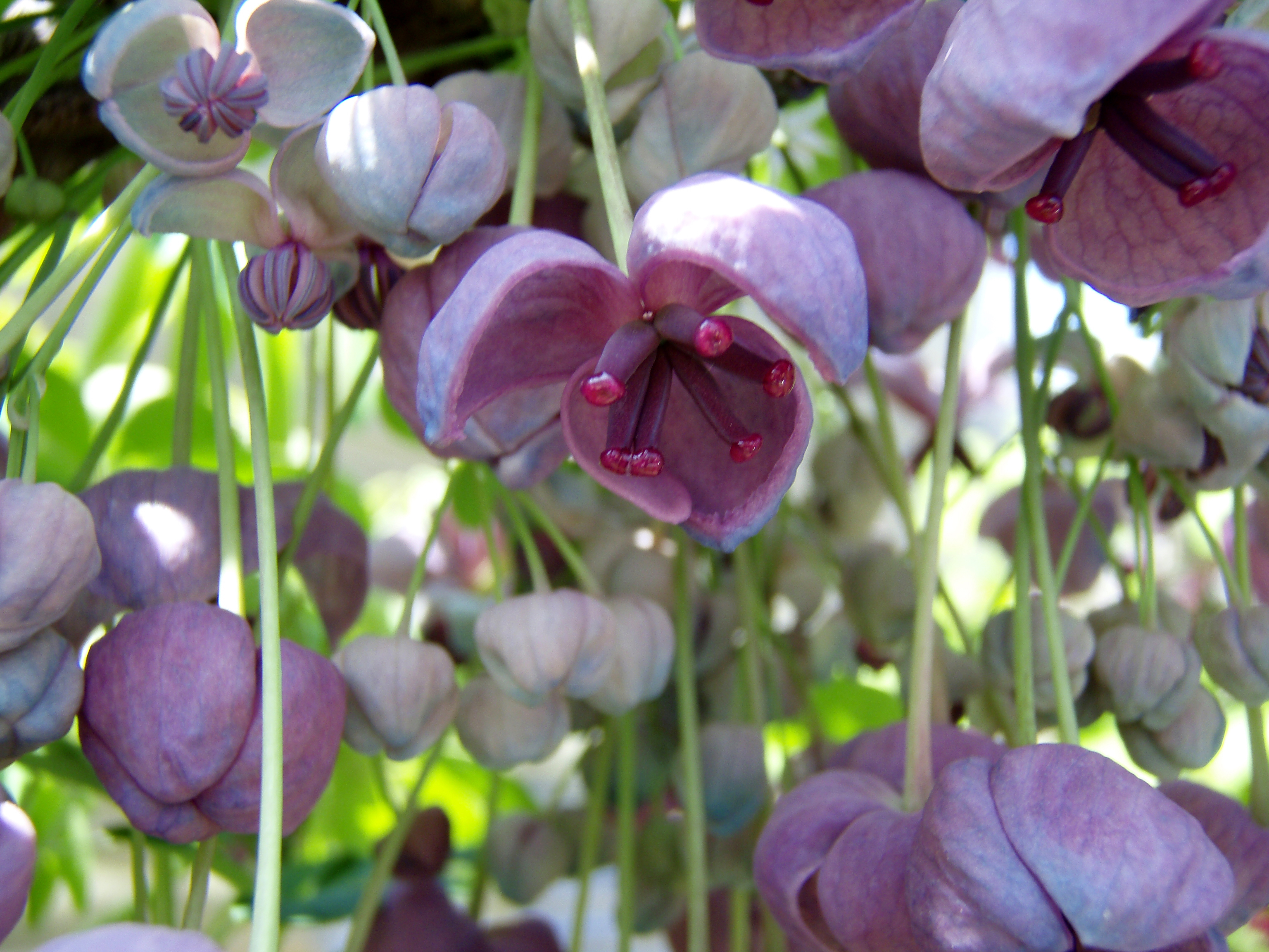 Akebia quinata (Nagano pref. Japan.)